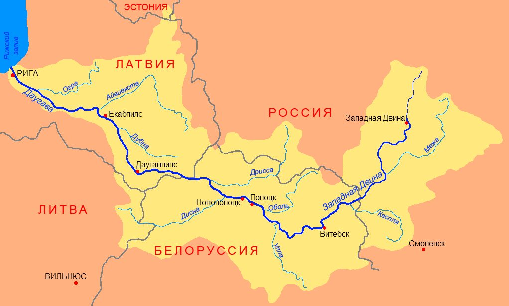 Схема бассейна реки Западная Двина (Даугава)